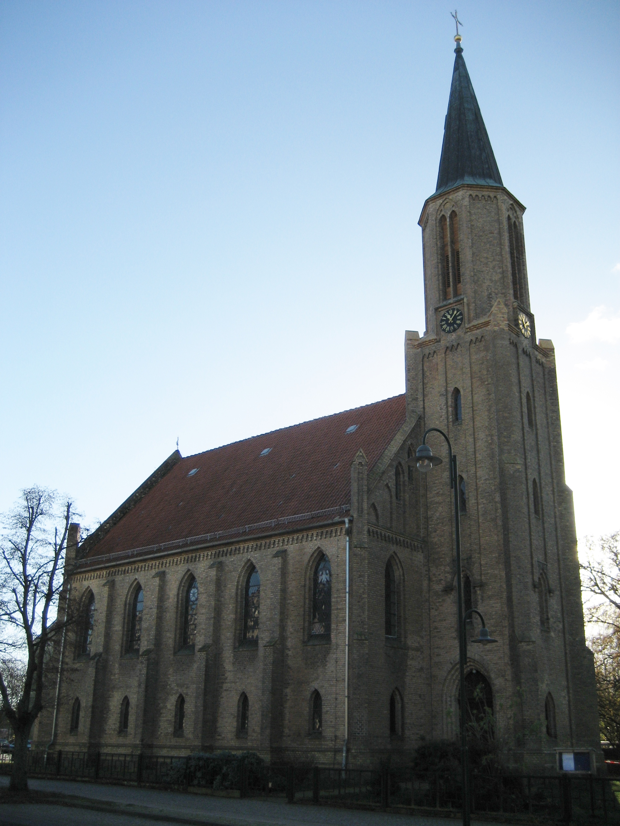 Löcknitzer Kirche aus Blickrichtung Nordwesten, von der Chausseestraße aus.